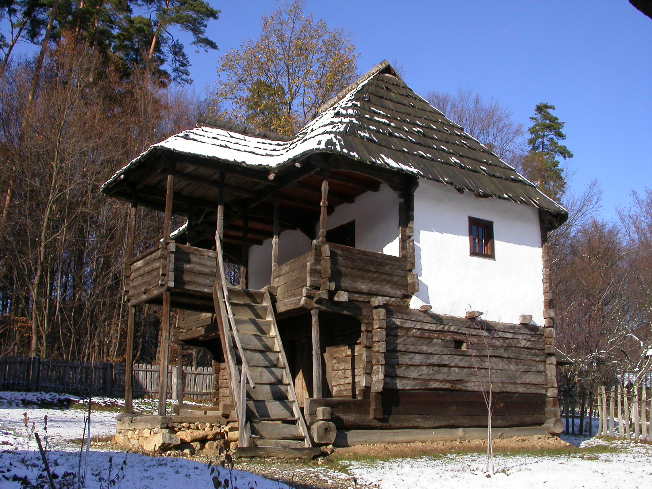 Muzeul Civilizației Populare Tradiționale ASTRA, 1963